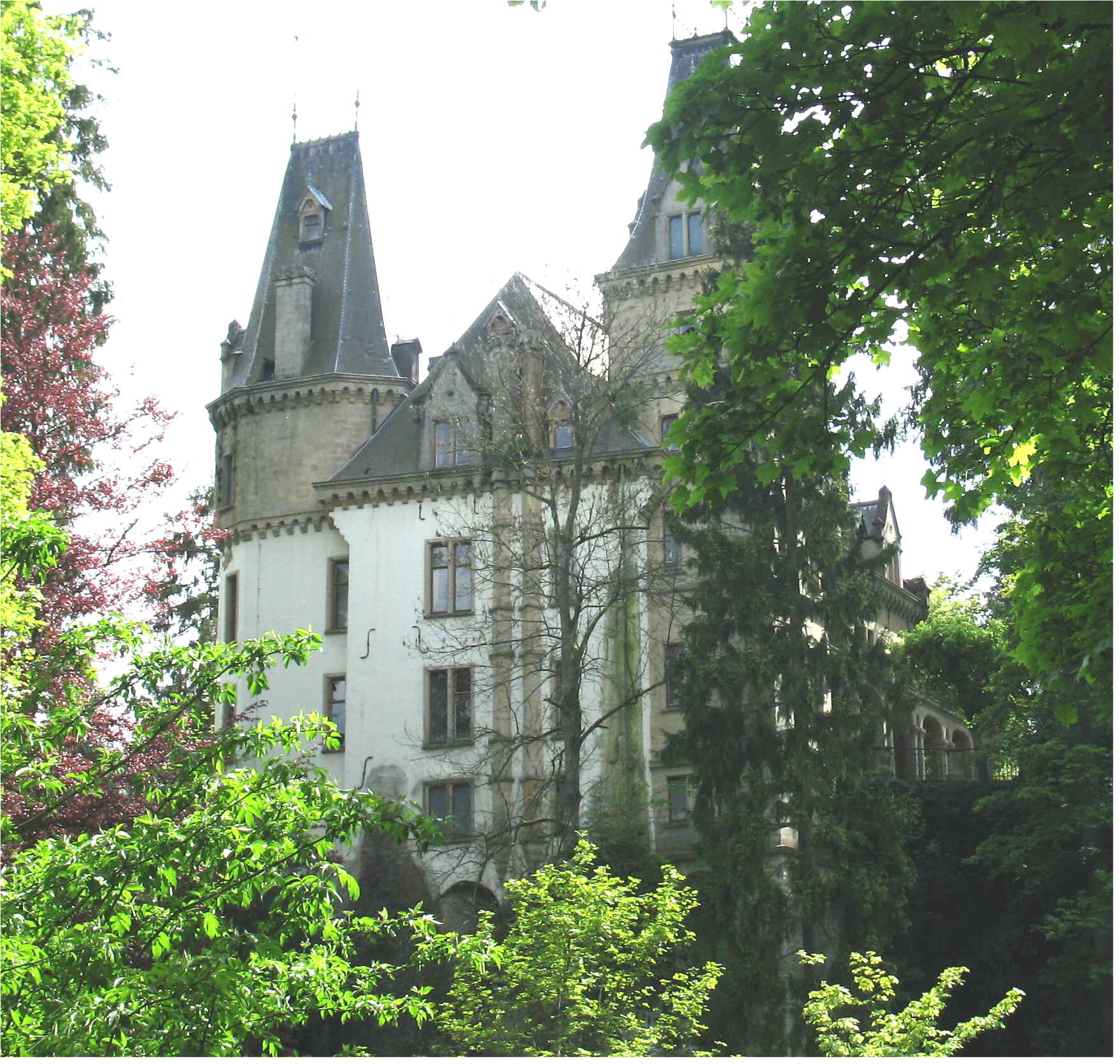 Schlass Meesebuerg.